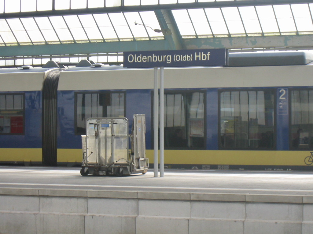 NordWestBahn in Oldenburg Hauptbahnhof